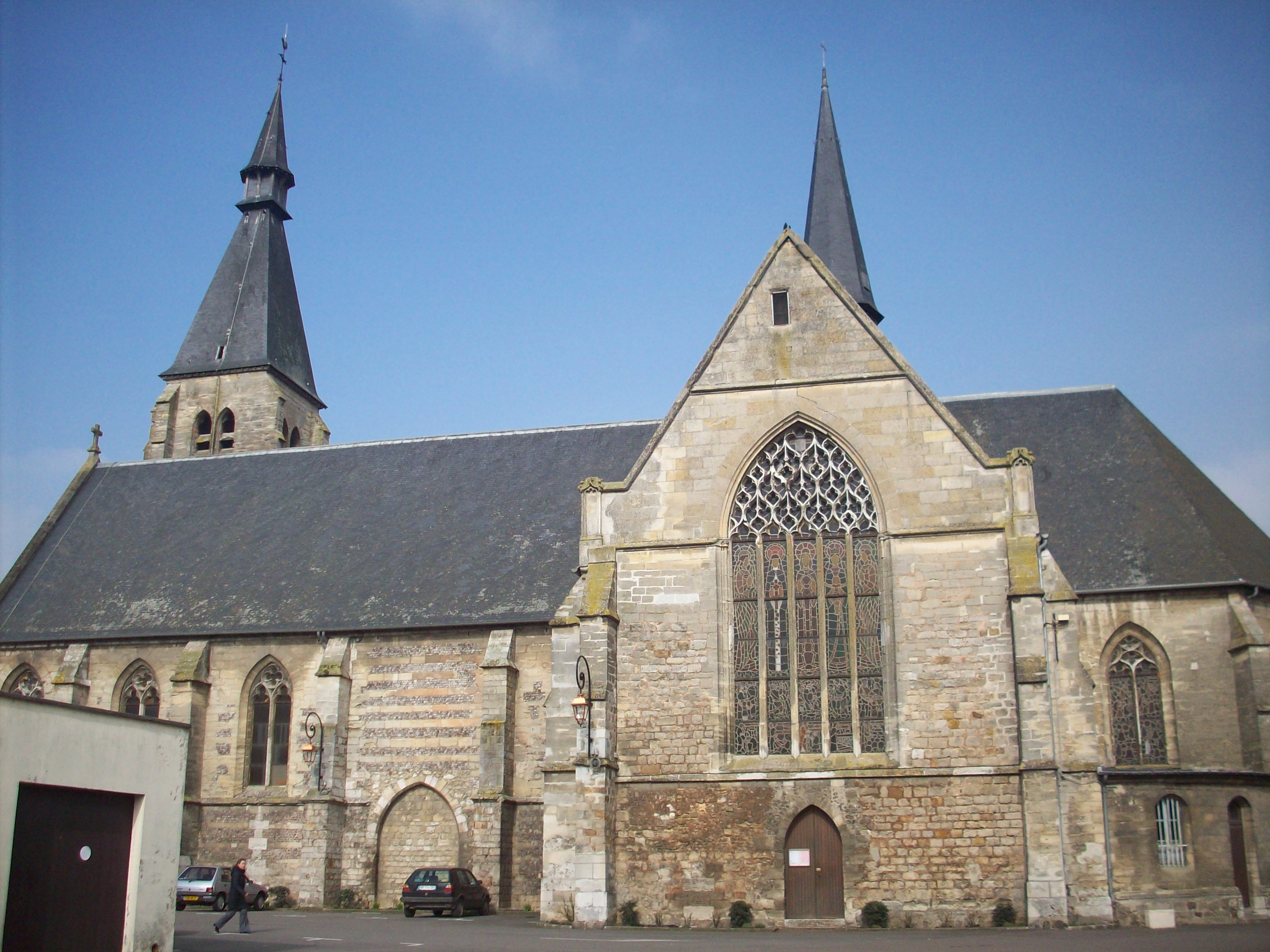 Église Saint-Gervais-Saint-Protais d'Etrépagny, du XIVe et XVe siècle, copie de la collégiale d'Écouis.